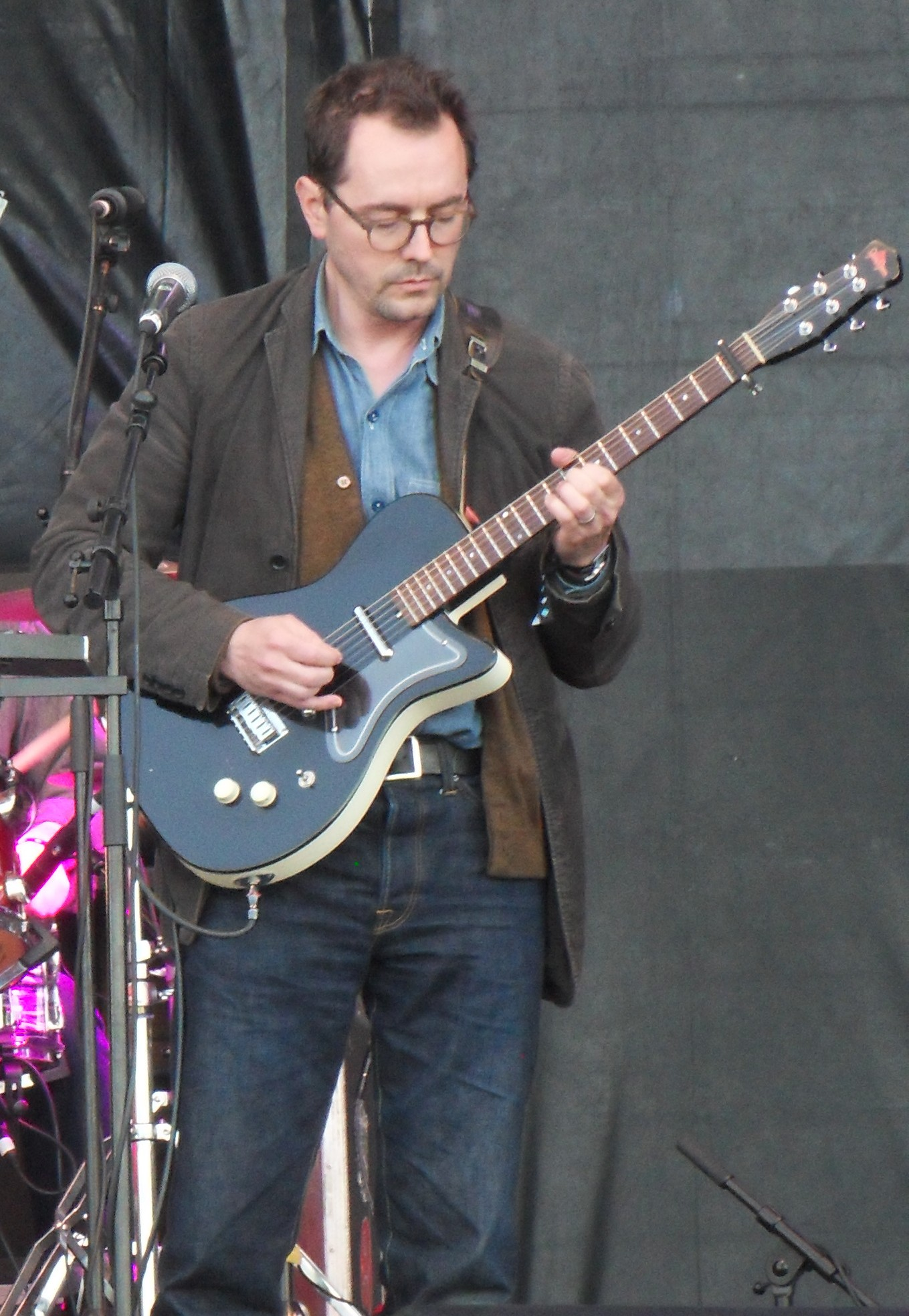 Archer Prewitt beim Konzert von The Sea and Cake auf dem Festival Primavera Sound 2013 in Barcelona